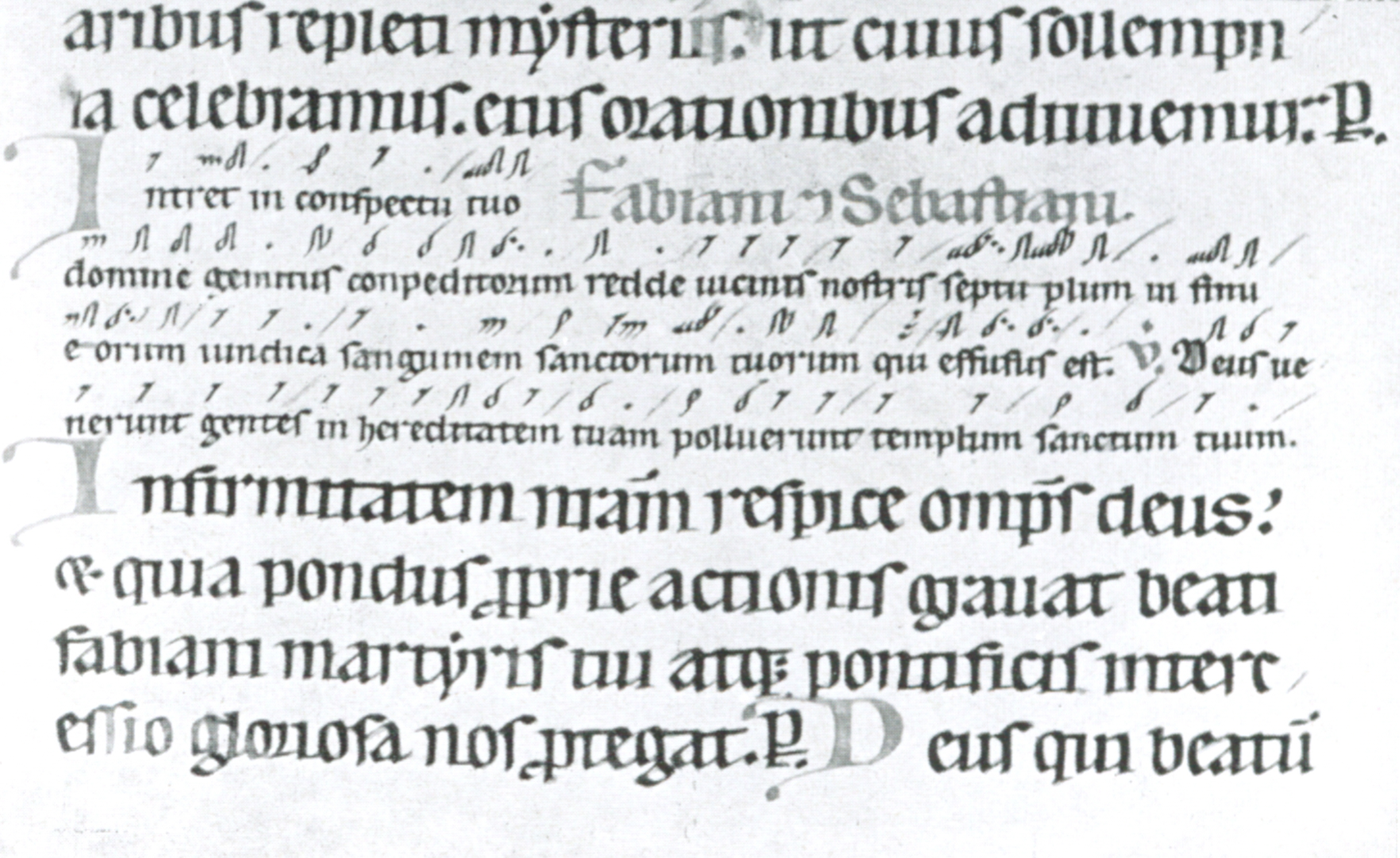 Meßbuch um 1200 (mit Neumen) Collection: Schloss Zeil